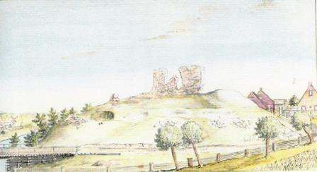 Joonistus Ropaži ordulinnusest XIX sajandist.